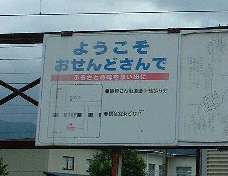 近江弁の一例 高月駅にて 広告部は画像処理済